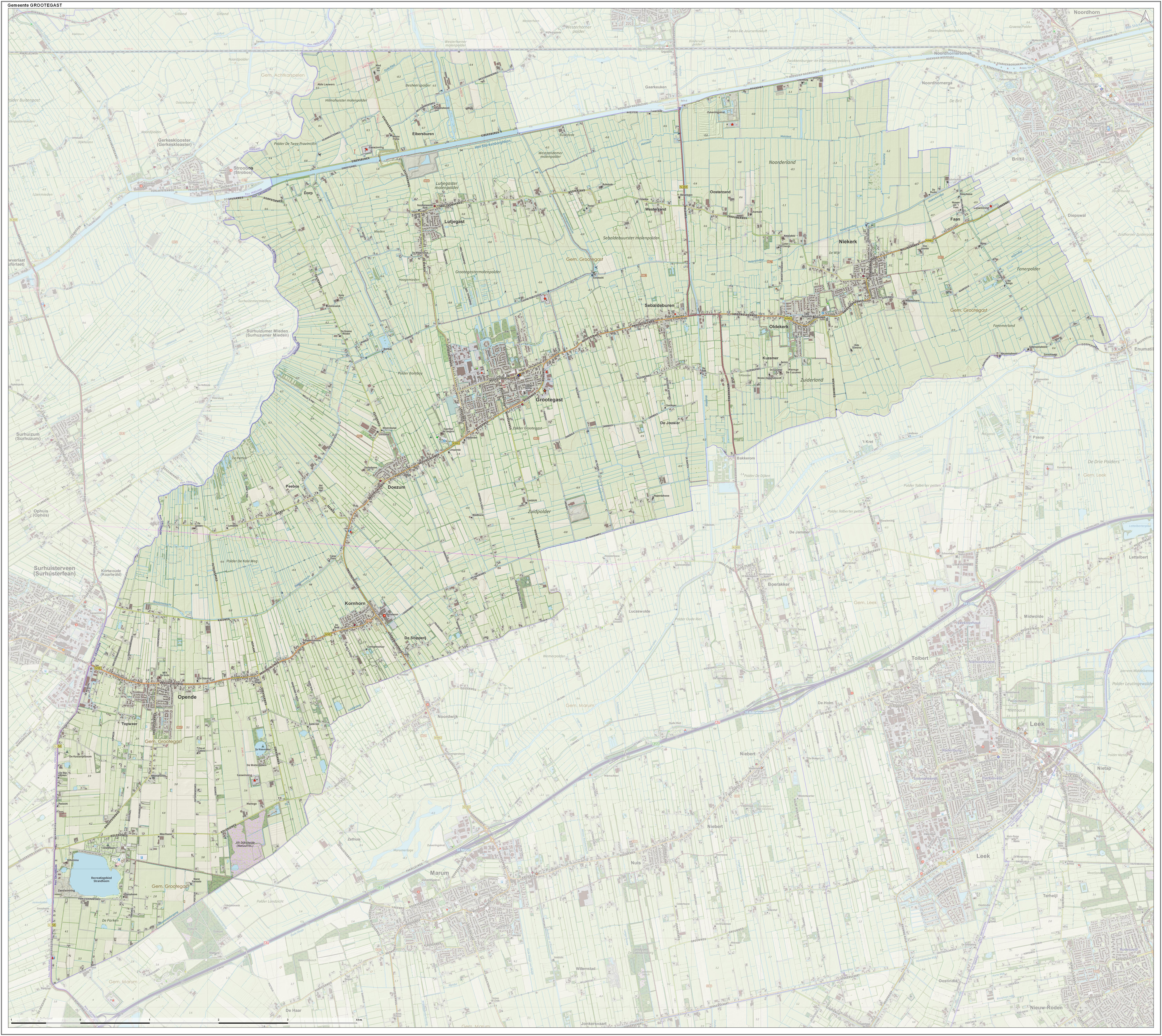 Topografische gemeentekaart. Resolutie: 400 pixels/km. Kaartbeeld samengesteld uit de open geodata van de Top10NL en Top25namen (Kadaster), Creative Commons-BY licentie. Gebouwvlakken uit open geodata BAG extract. Wegen uit de OpenStreetMap, OpenStreetMap community. Reliëfschaduw uit de Actuele Hoogtekaart AHN2. Samenstelling en kleurenschema: Jan-Willem van Aalst, met QGIS. Zie ook de Legenda.